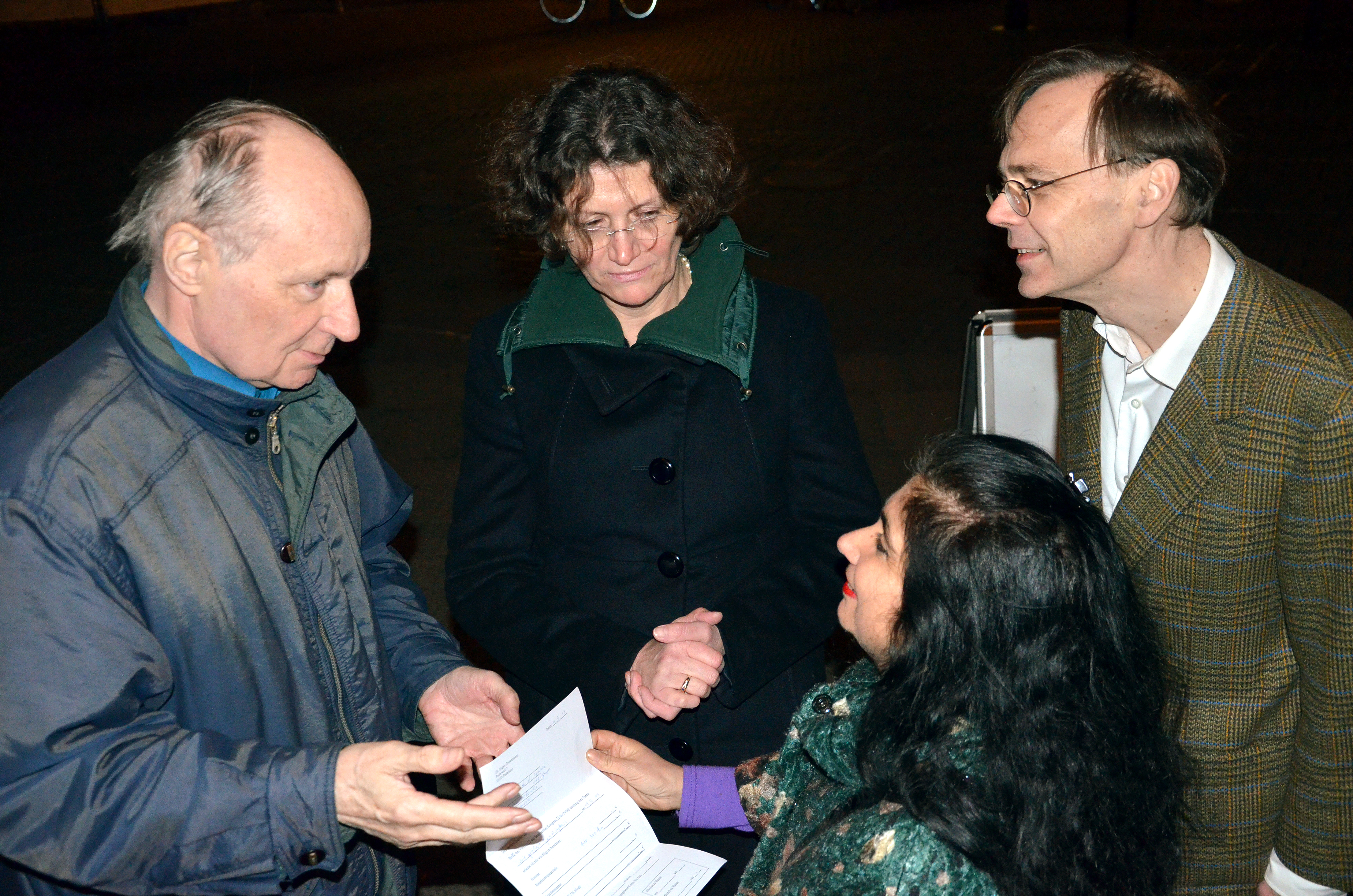 Zum 4. Festival der Philosophie war Professor Eugen Drewermann (links) 2014 in Hannover angereist. Vor seinem Vortrag in der Marktkirche unter dem Titel "Wenn Eure Gerechtigkeit nicht größer ist ...", in der er die Bergpredigt als die Rede von der wahren Gerechtigkeit auslegte, traf er sich vor dem Kirchenportal mit (von links) Pastorin Hanna Kreisel-Liebermann, Assunta Verrone und Peter Nickl ...